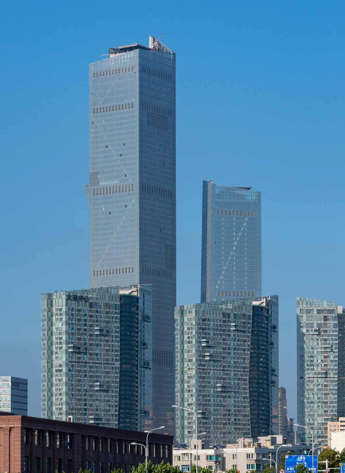 Eton Place Dalian Tower, Aug2018 (cropped)